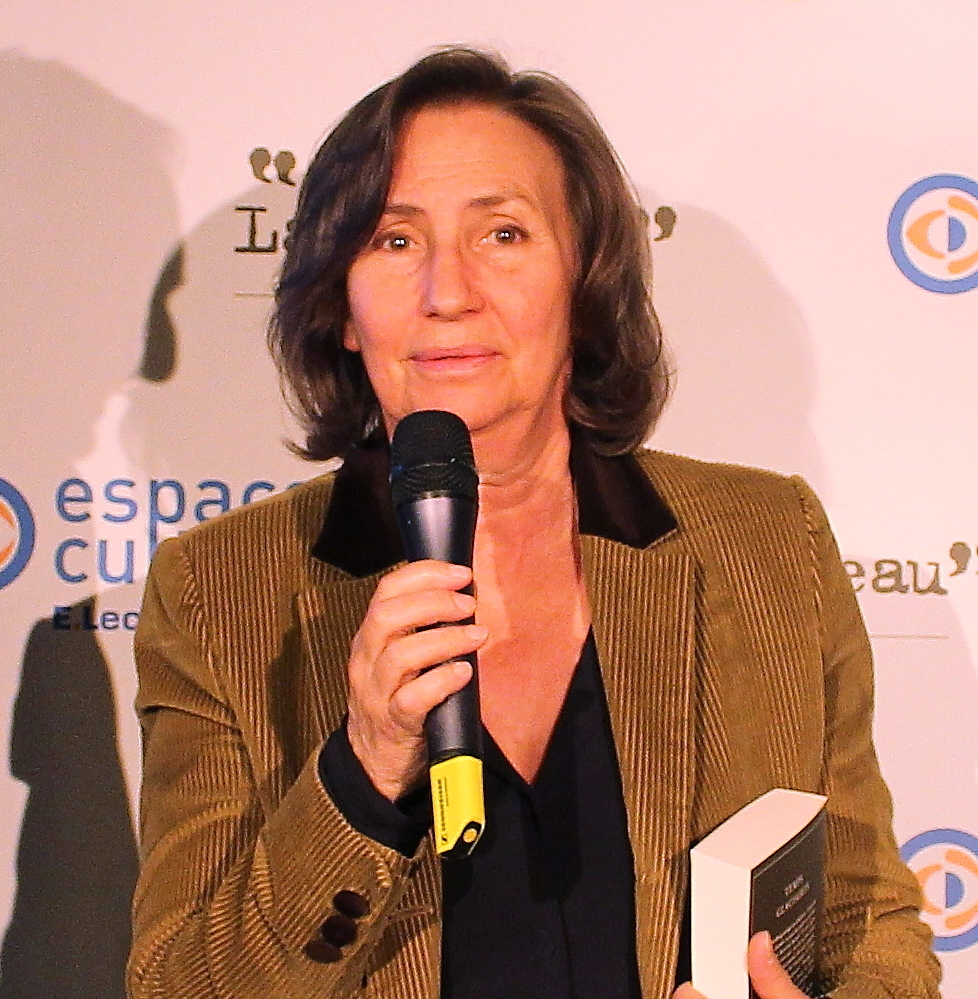 Michel-Édouard Leclerc, Teresa Cremisi, Karine Papillaud, Paul Colize - Prix Landerneau Polar 2015, remis à Fred Vargas